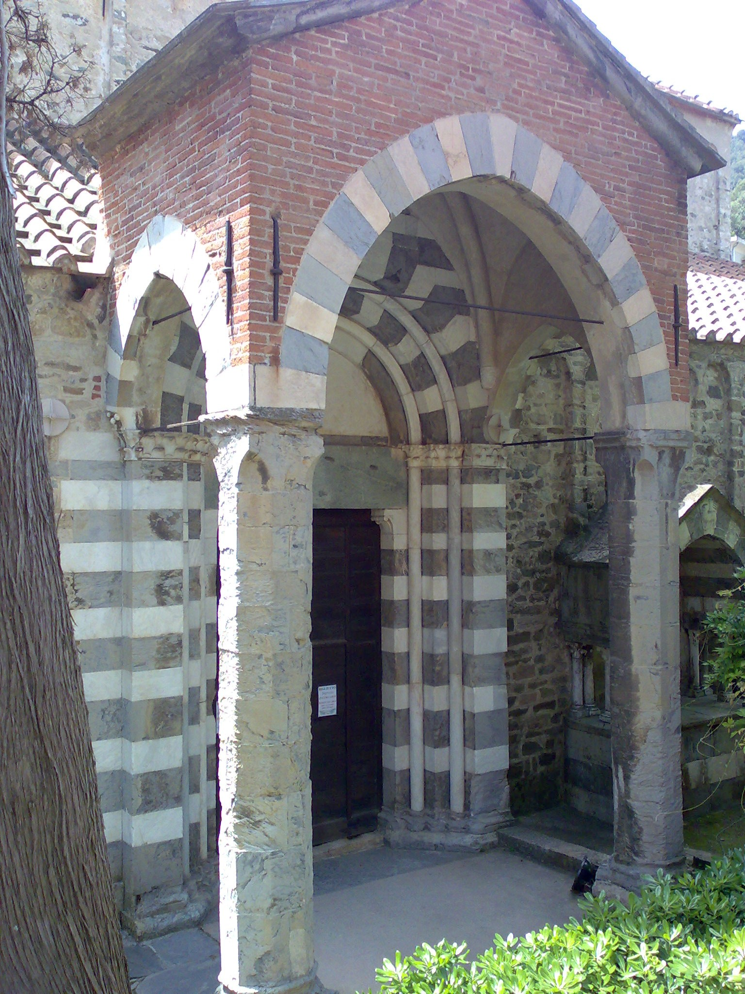 Ingresso laterale della chiesa di San Paragorio in Noli SV (Italy)